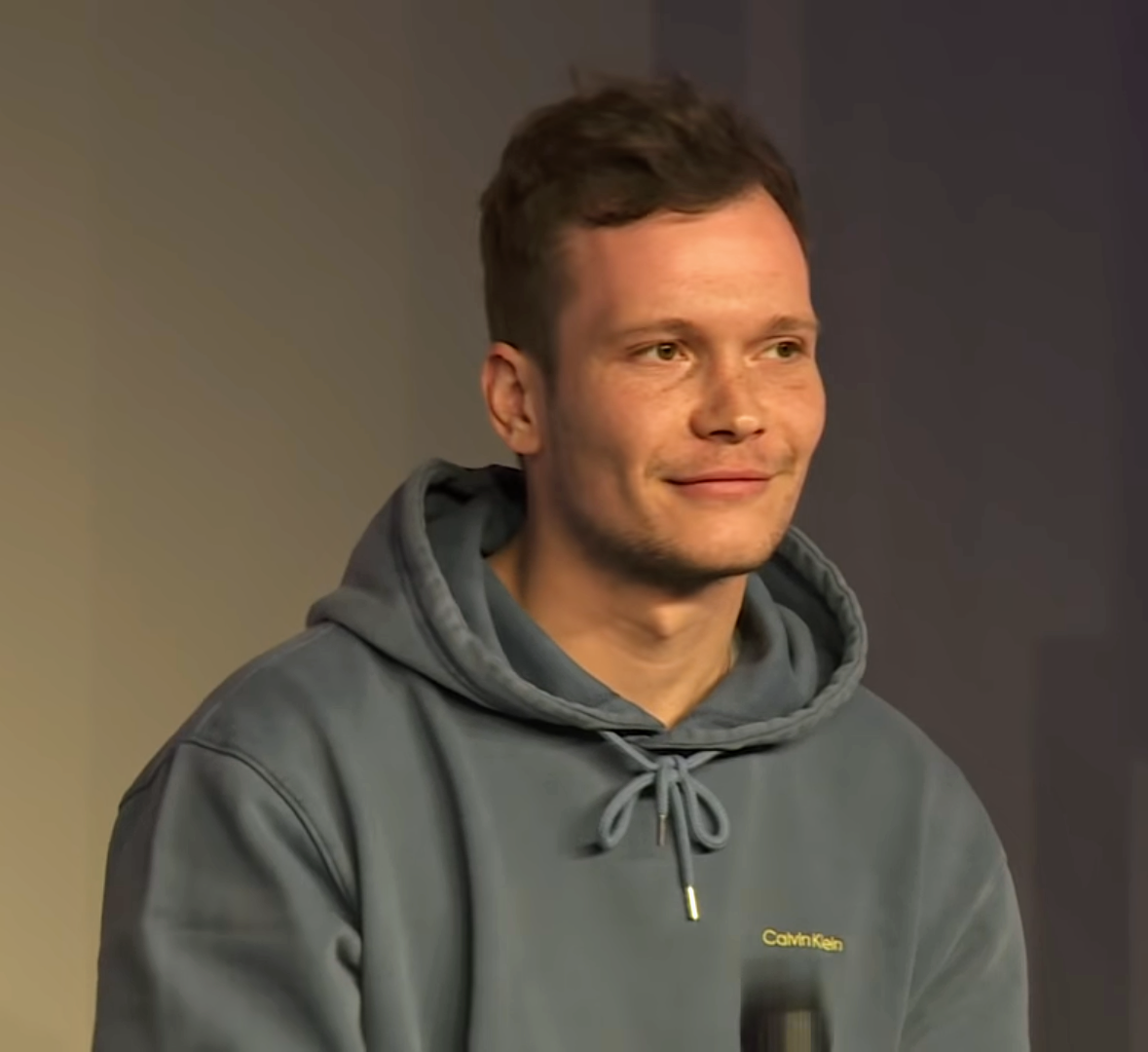 Find out more at: HipHop ist politisch geboren und HipHop ist politisch geblieben. Egal, ob international oder in der Bundesrepublik: Von N.W.A. bis K.I.Z., von Advanced Chemistry bis Kendrick Lamar. Rap liebt Politik, Politik liebt Rap – manchmal offensiv aus jeder Zeile, manchmal versteckt zwischen den Reimen. “Machiavelli” widmet sich dem Kleingedruckten und sucht zwischen den Zeilen nach dem Wissen und der Kontroverse. Bei der #rp19 bringen wir die Politikerin Diana Kinnert und die Rapperin Sookee zusammen. Creative Commons Attribution-ShareAlike 4.0 Germany (CC BY-SA 4.0 DE)